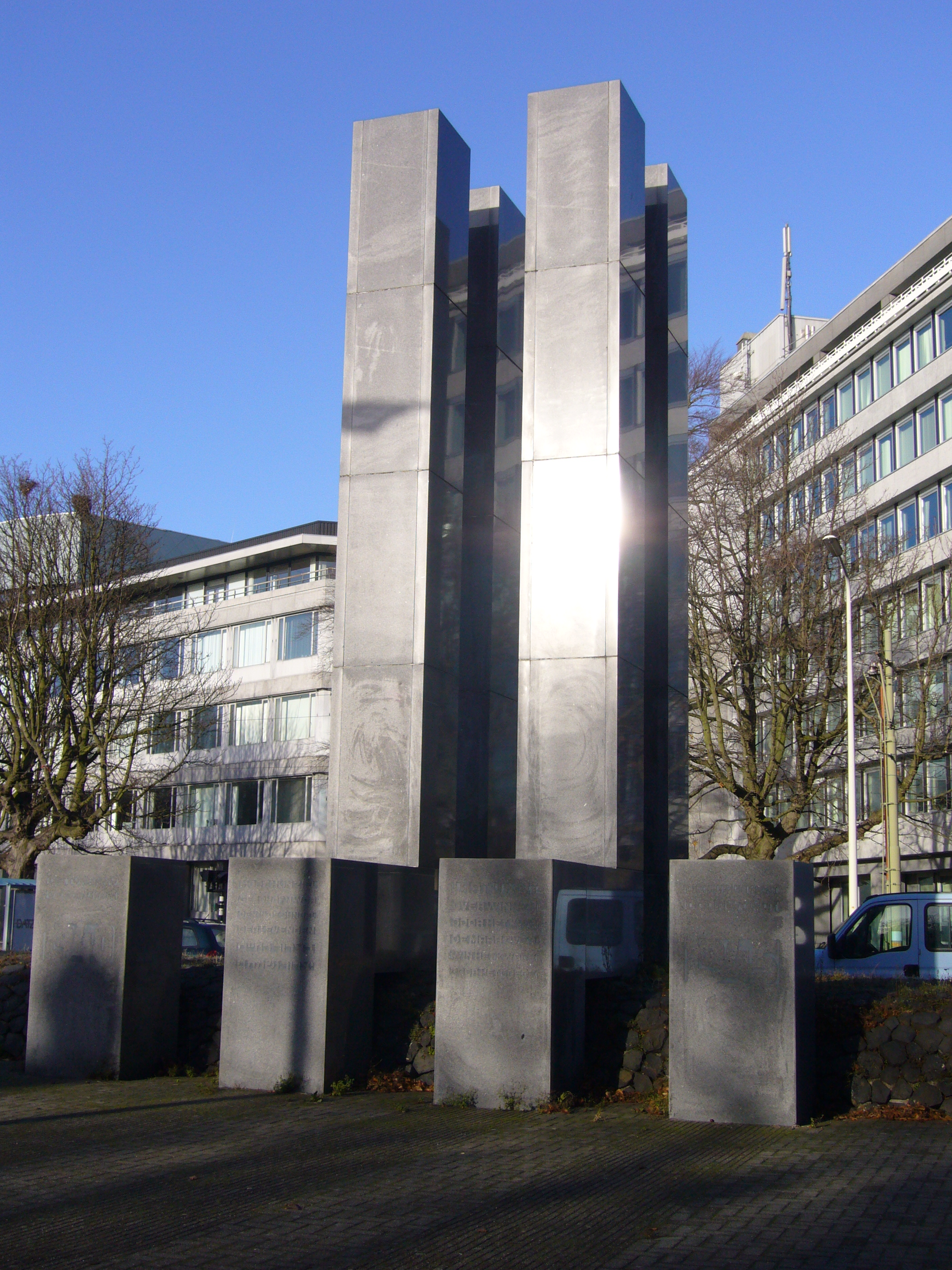 Monument voor het Vredespaleis, 1940-1945 (Appie Drielsma 1992)